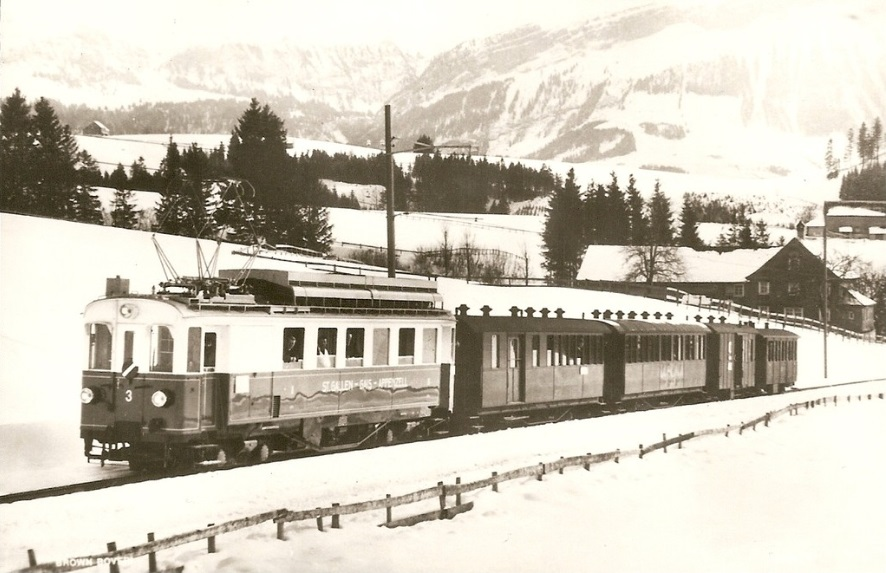 Zug der SGA mit BCFe 4/4 3 im Anstieg von Appenzell nach Sammelplatz. Noch keiner der Wagen trägt den mit der Elektrifikation eingeführten Anstrich in Grün/Crème.